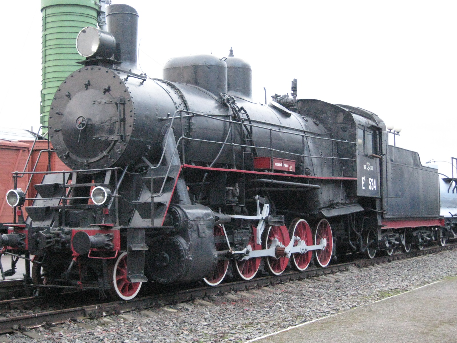 Грузовой паровоз ЕЛ 534 Вес паровоза в рабочем состоянии:без тендера91,2 тстендером140 тКонструкционная скорость70 км/чМаксимальная мощность на ободе колеса1600 л.с. Построен Американской паровозостроительной компанией (АЛКО) в Скенектеди в 1917 г. Музей железнодорожной техники, Санкт-Петербург